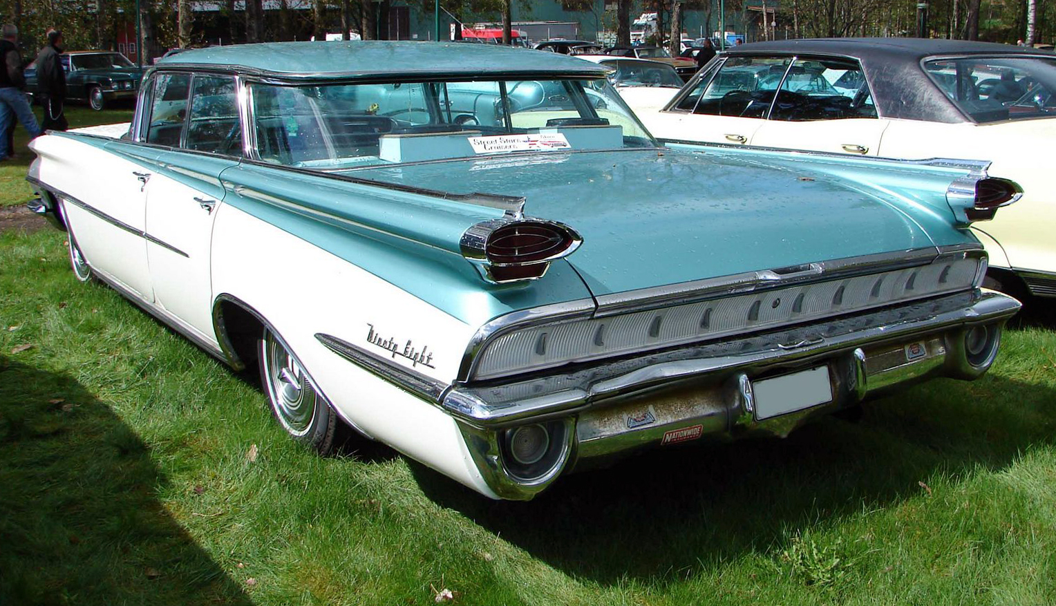 Oldsmobile 98 1959 at Skara Folkets park, Sweden